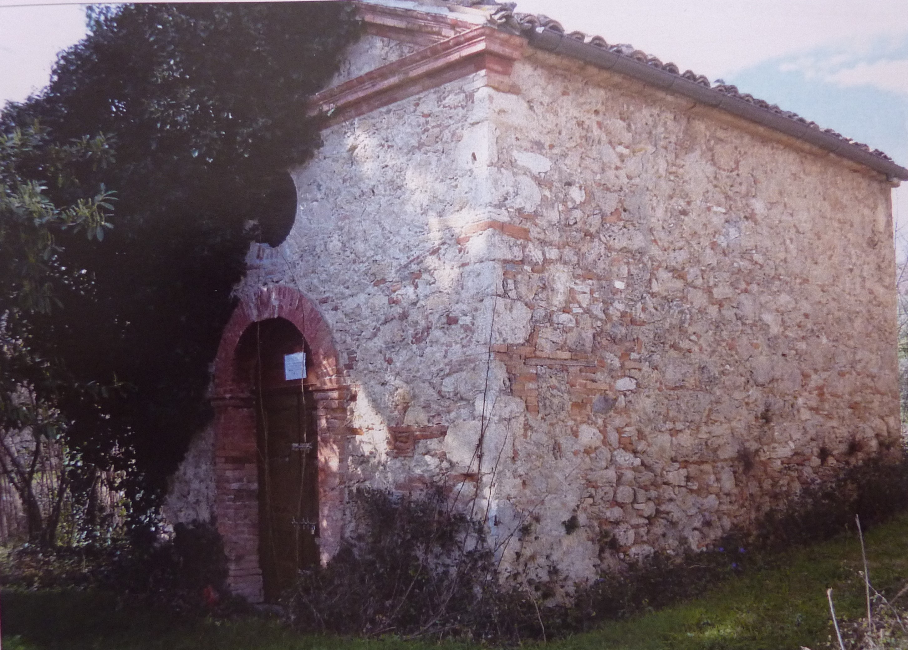 chiesetta di San Giuseppe, facciata